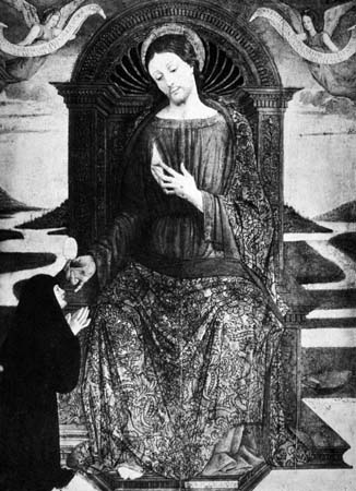 Auteur décédé depuis plus de 100 ans